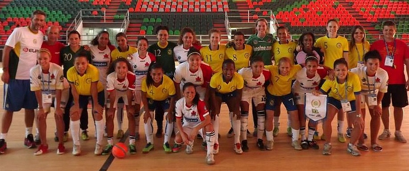 Foto da Seleção Brasileira de Futebol de Salão Feminino e da Seleção do Canadá em amistoso na Colômbia, após eliminação de ambas as equipes do II Mundial Feminino em 2013.